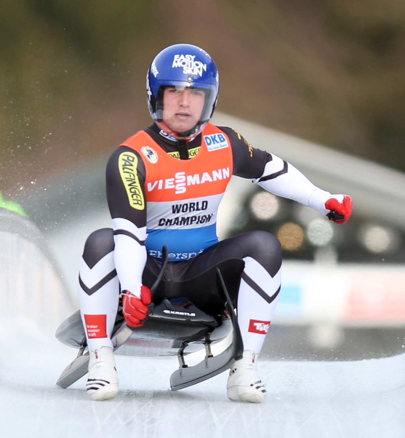 Wolfgang Kindl beim Rennrodel-Weltcup der Herren in Altenberg 2017